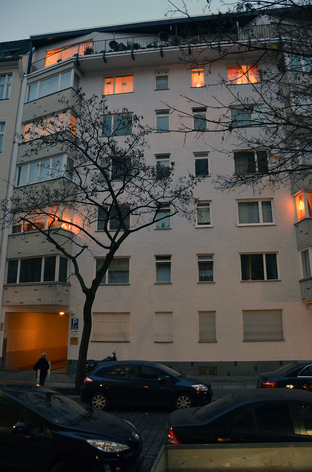 Im Gebäude Lohmeyerstraße 6 in Berlin-Charlottenburg wohnte bis zu seinem Tode der Schauspieler, Kabarettist und Filmemacher Wolfgang Neuss ...